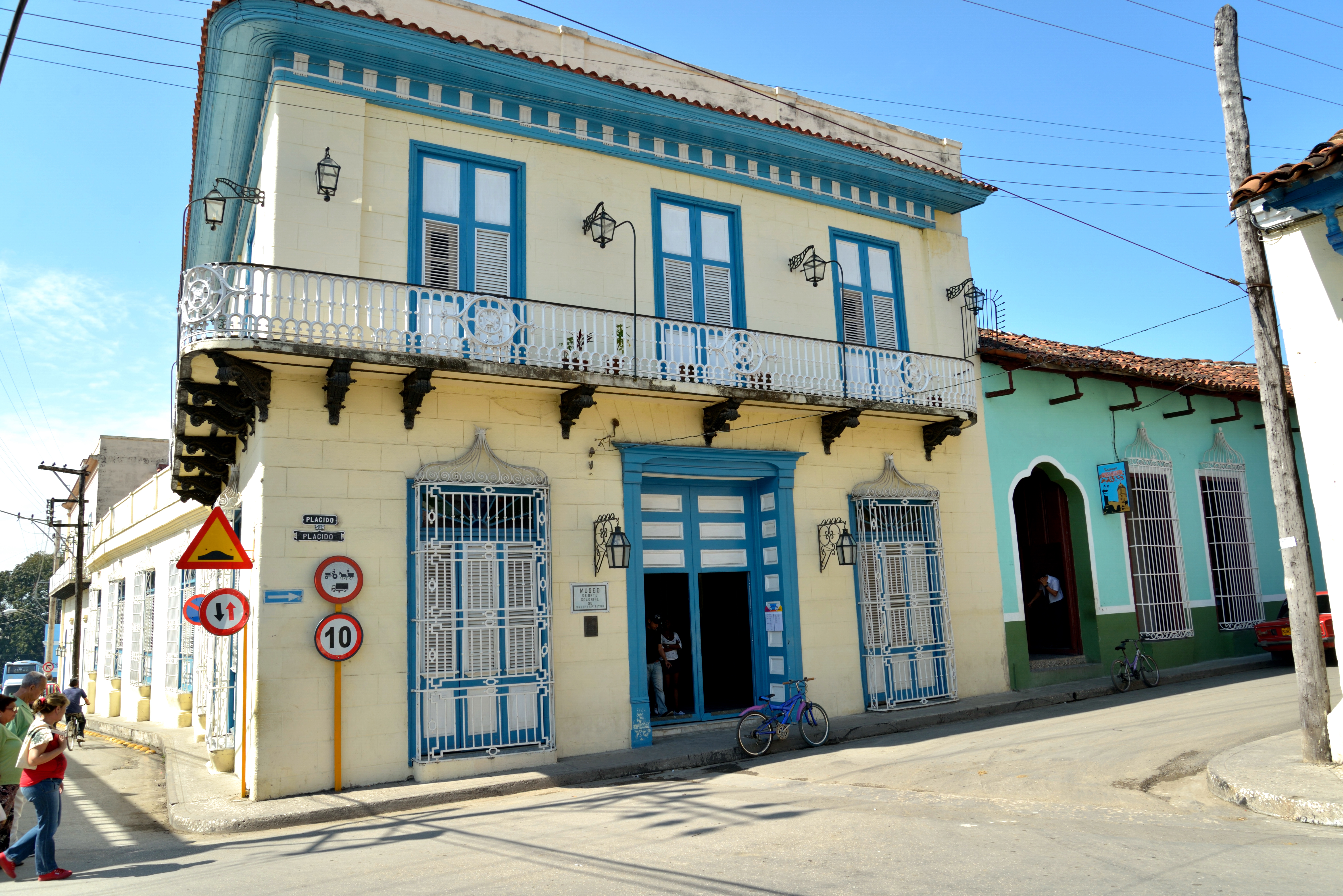 musée arte colonial